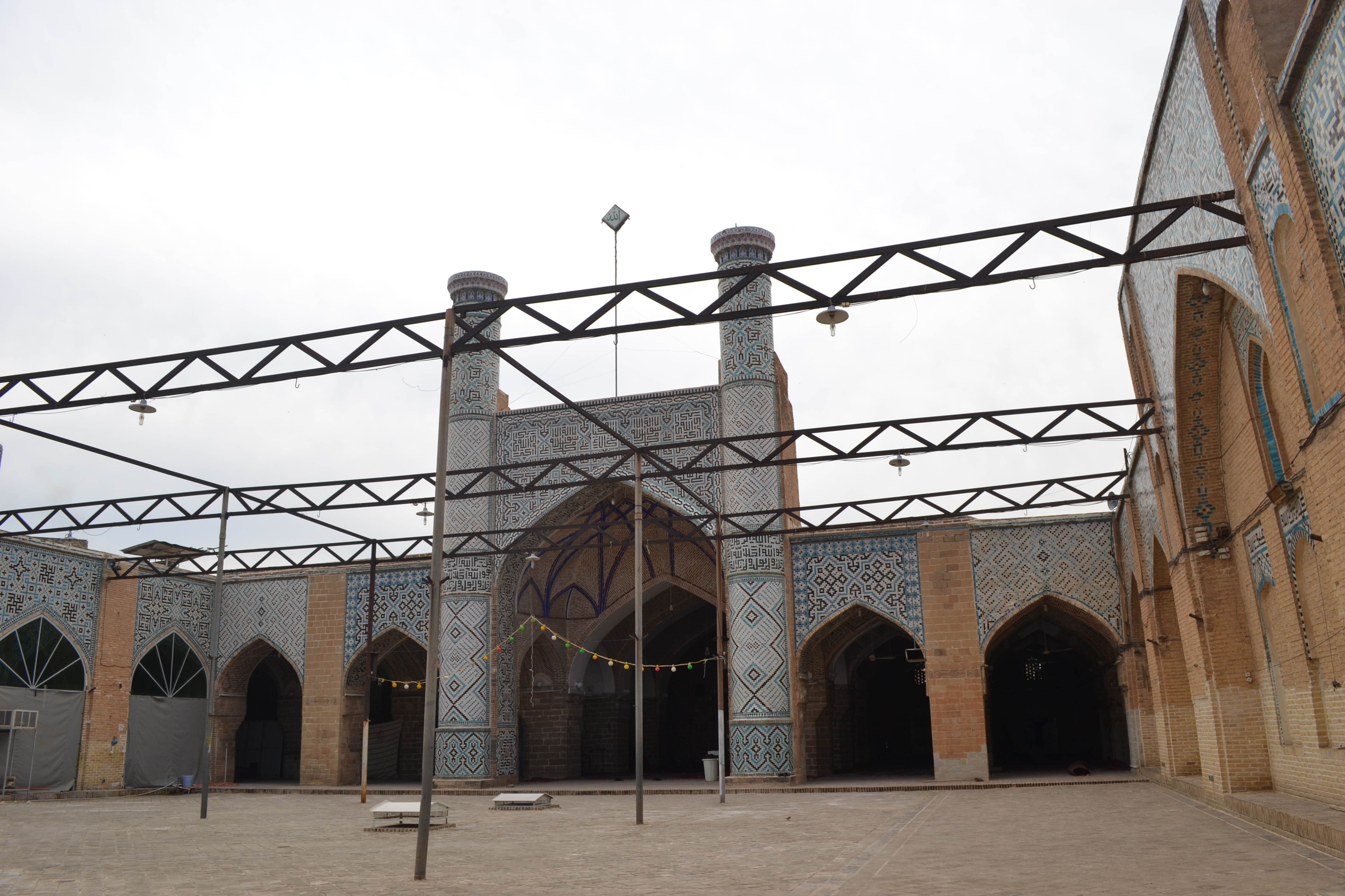 مسجد جامع